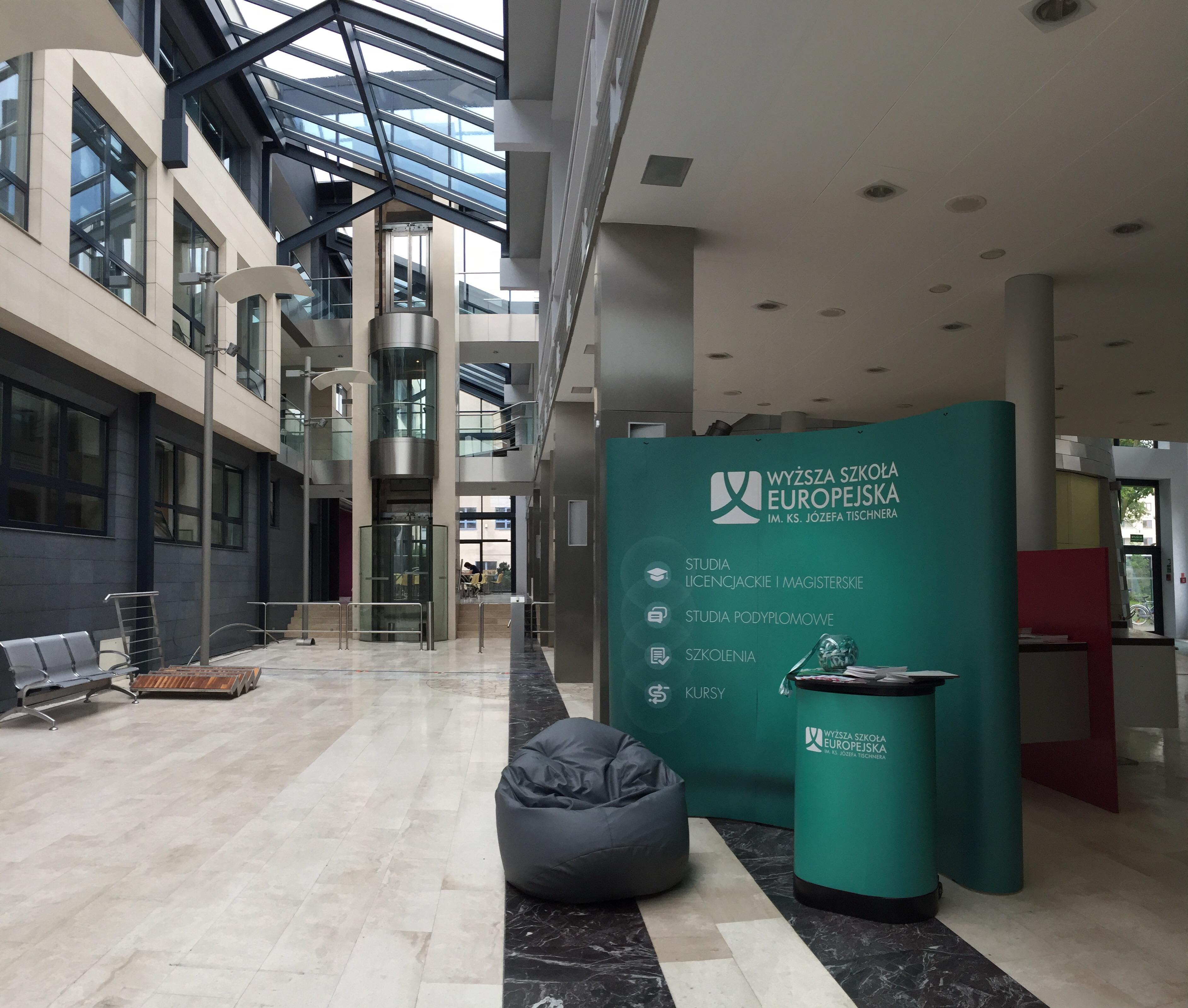 Kraków - główny hol w budynku WSE